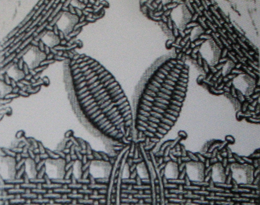 Klöppeltechnik: Formenschlag